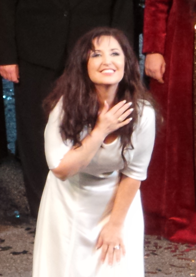 Elena Mosuc protagoniza "Lucia di Lammermoor" de Donizetti con Juan Diego Flórez en el Gran Teatro del Liceu. Diciembre de 2015